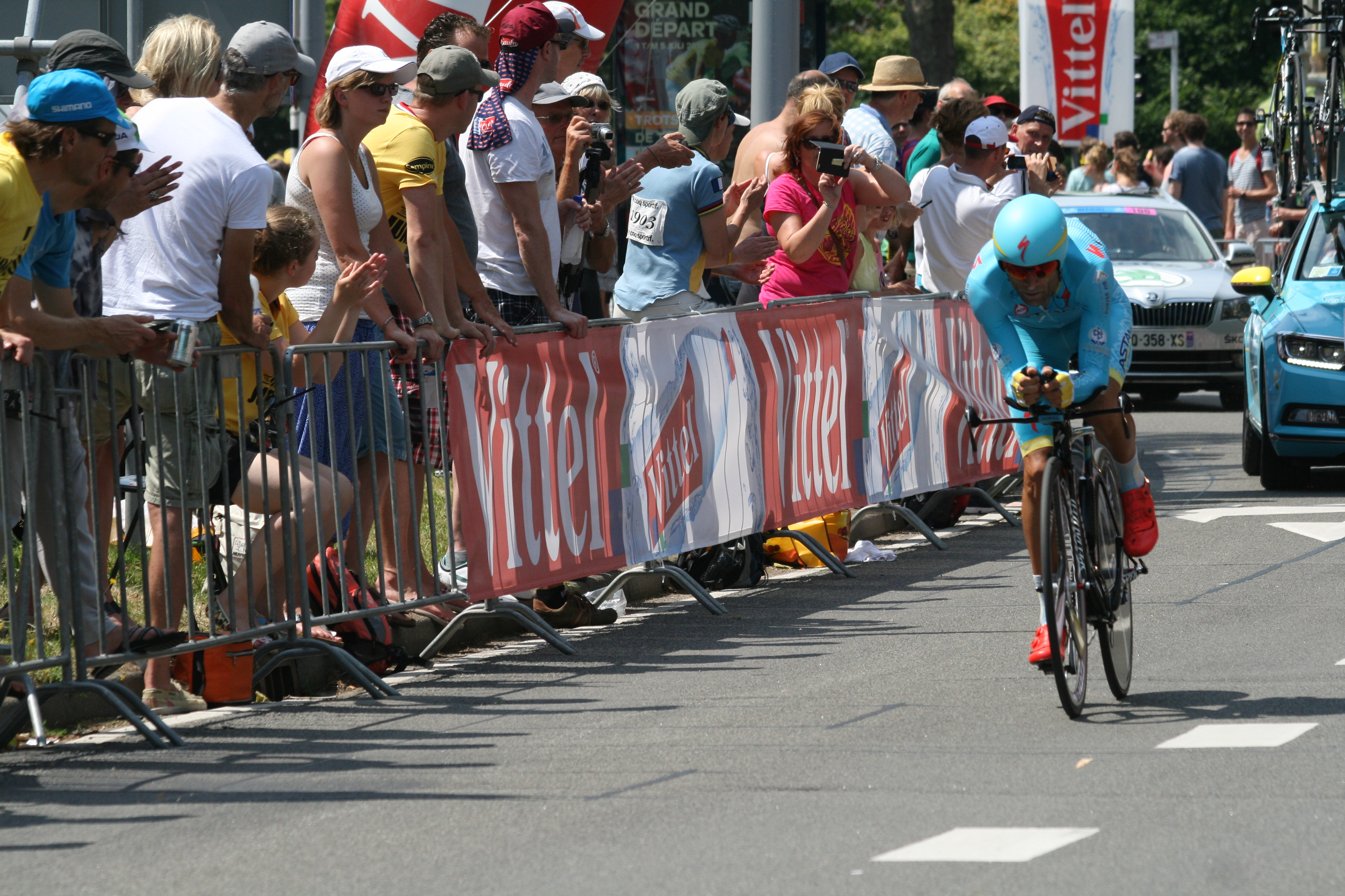 Proloog Tour de France Utrecht